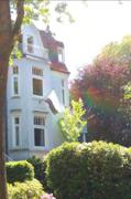 Foto des Hauses des Corps Irminsul Hamburg